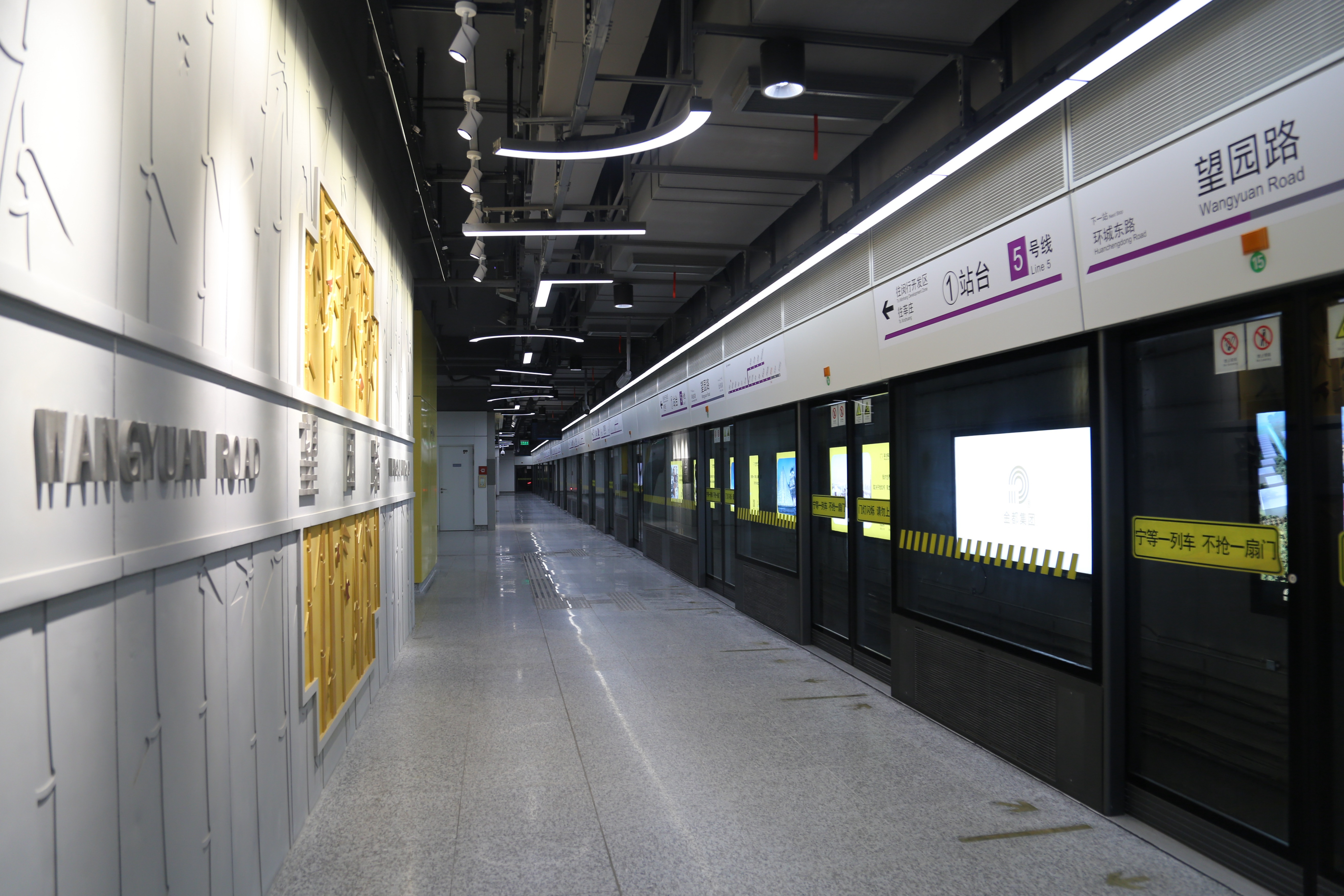 望园路站站台